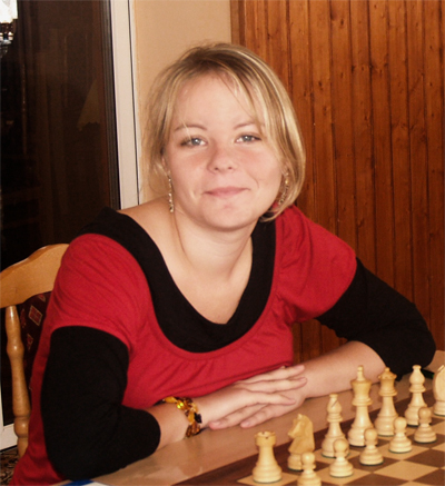 Polska szachistka Katarzyna Toma podczas rozgrywek Ekstraligi Seniorów w Karpaczu.